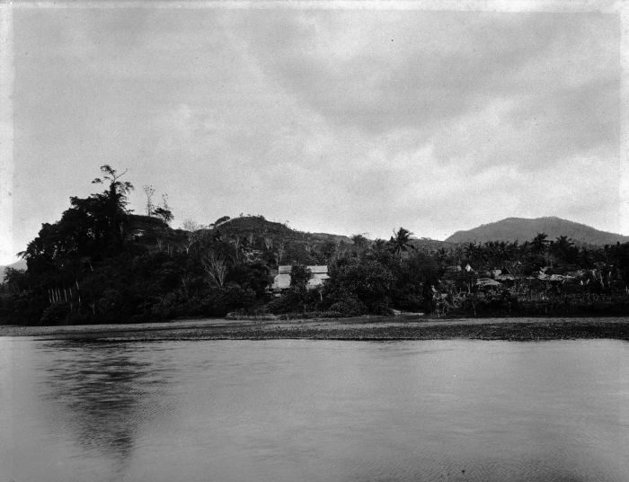 Foto. Kalkbranderijen nabij Kaliradja aan de Logawa rivier.